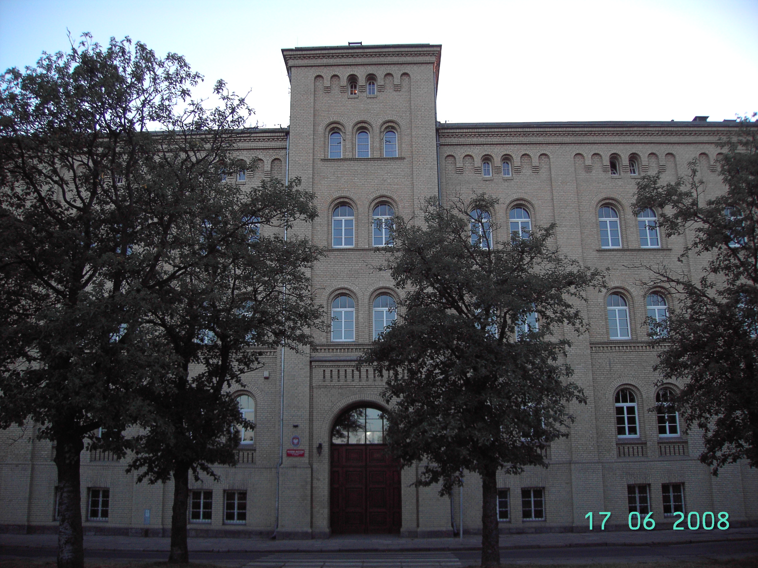 Akademia Muzyczna im. Stanisława Moniuszki w Gdańsku. / Dawne koszary.